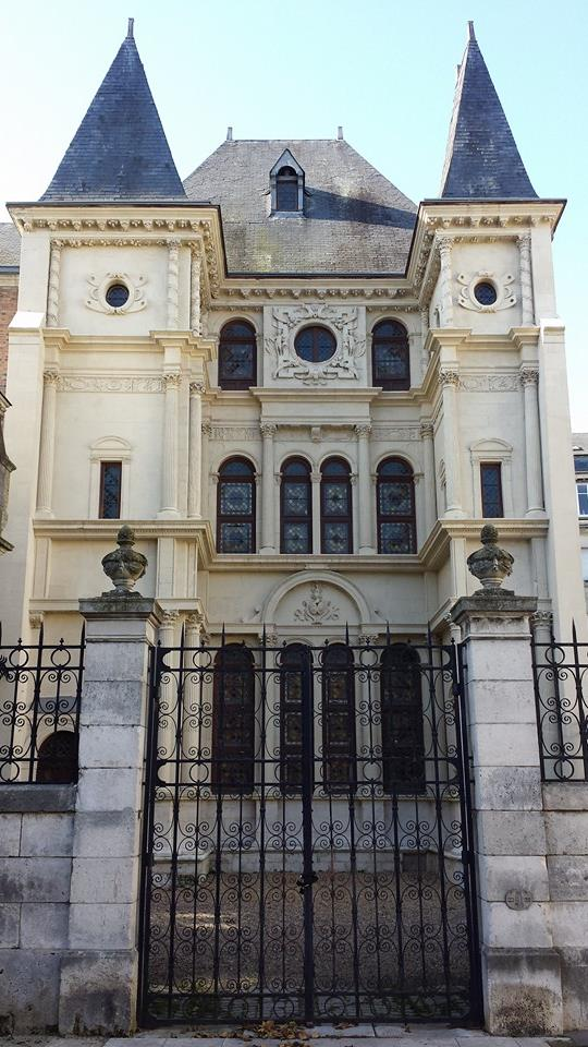 Hôtel d'époque Renaissance (XVIe siècle) à Orléans aujourd'hui Musée Archéologique et Historique de l'Orléanais.